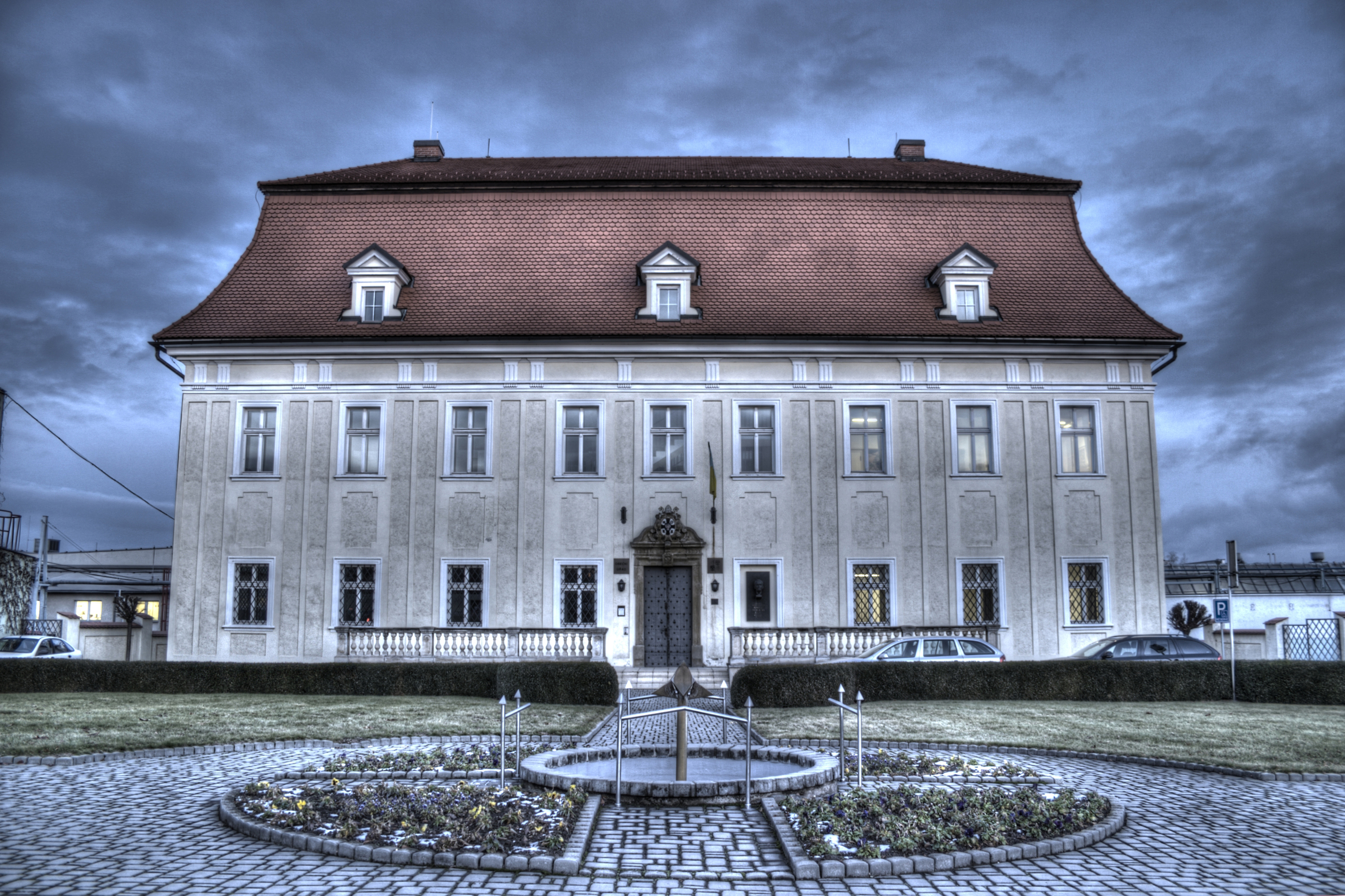 Zámek Bolatice, Hlučínská 95/3, Bolatice